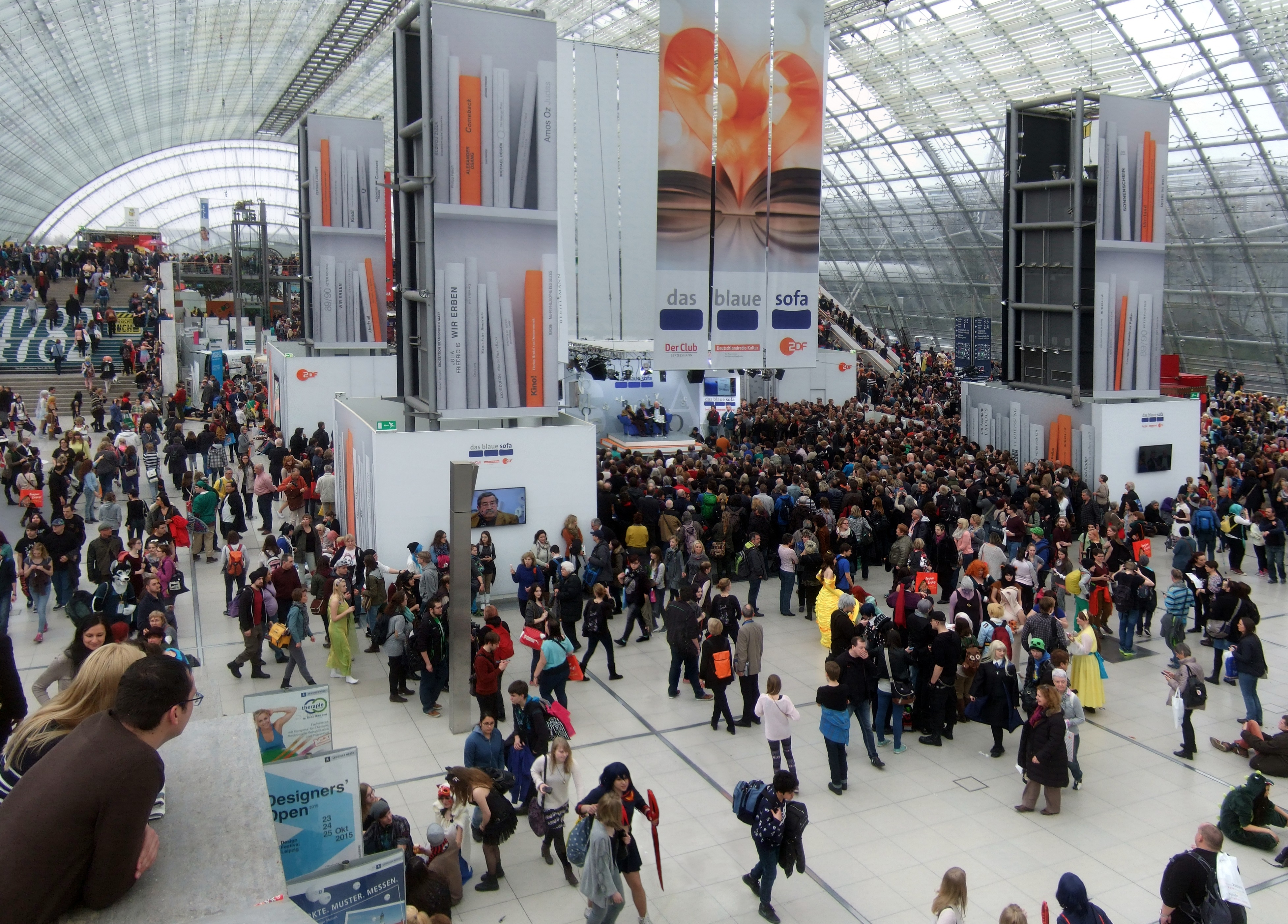 Besucheransturm in der Glashalle während der Buchmesse 2015